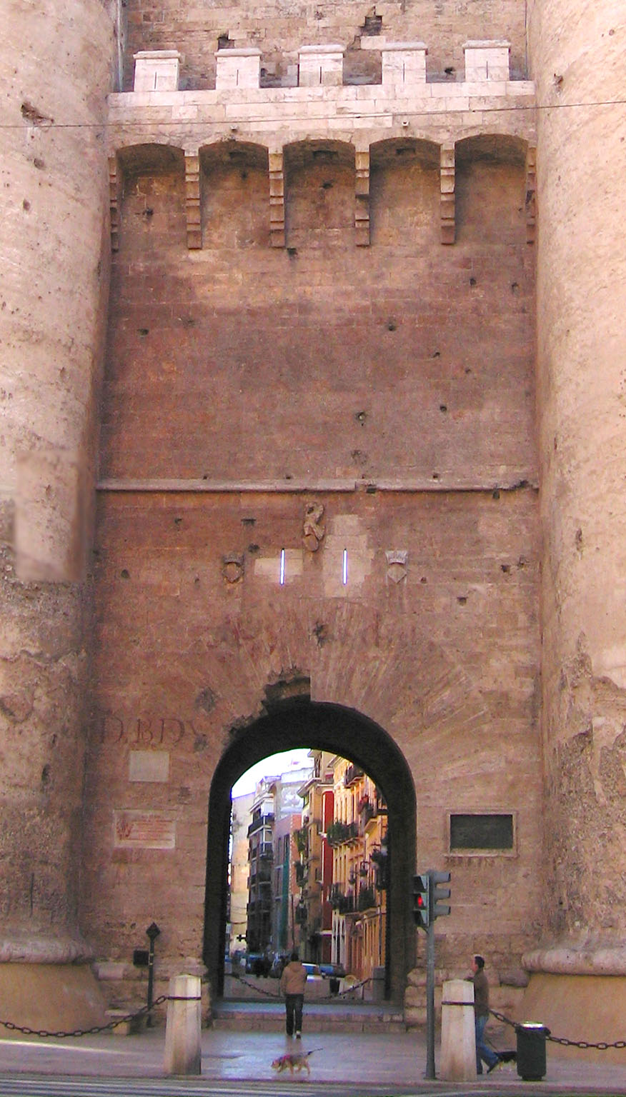 Porta de les torres de Quart (València)